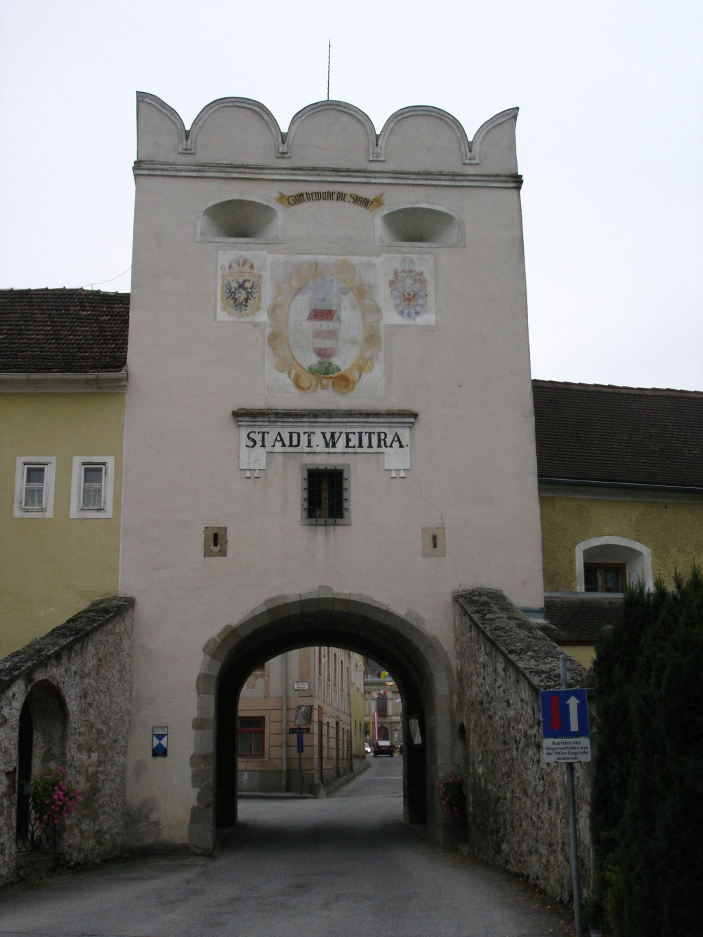 Stadttor Weitra